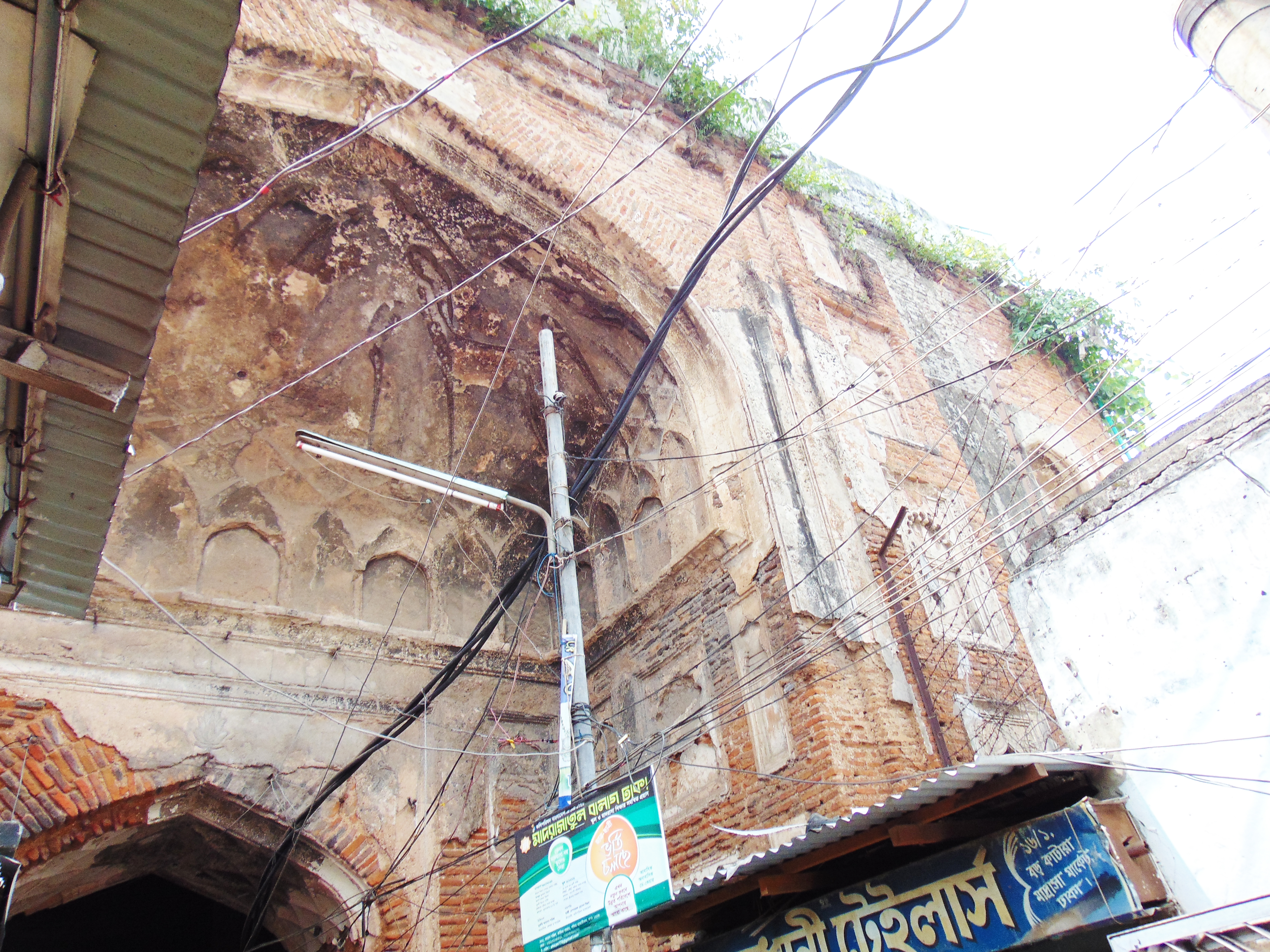 ছোট কাটরা